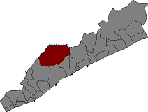 Localització de Dorsius al Maresme